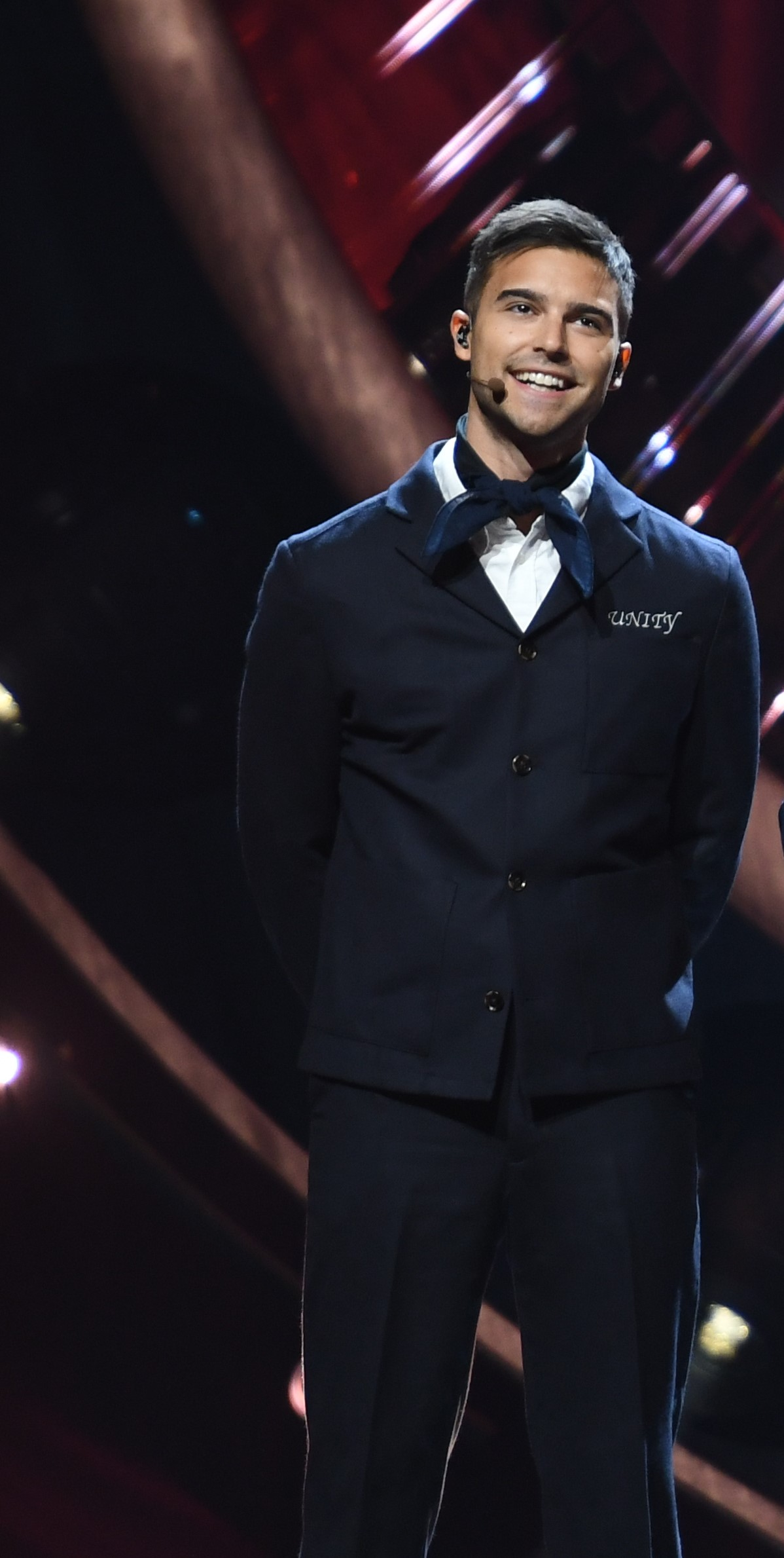 Melodifestivalen 2019, deltävling 1, Scandinavium, Göteborg, intro, Eric Saade